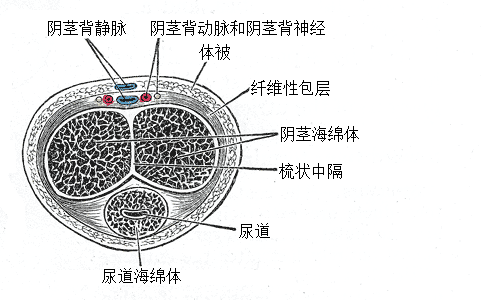 en Cross-section of penis ru Мужской половой член в поперечном разрезе. Две верхних овальных структуры - пещеристые тела, а нижняя - губчатое тело, в котором проходит уретра. zh 阴茎横切面